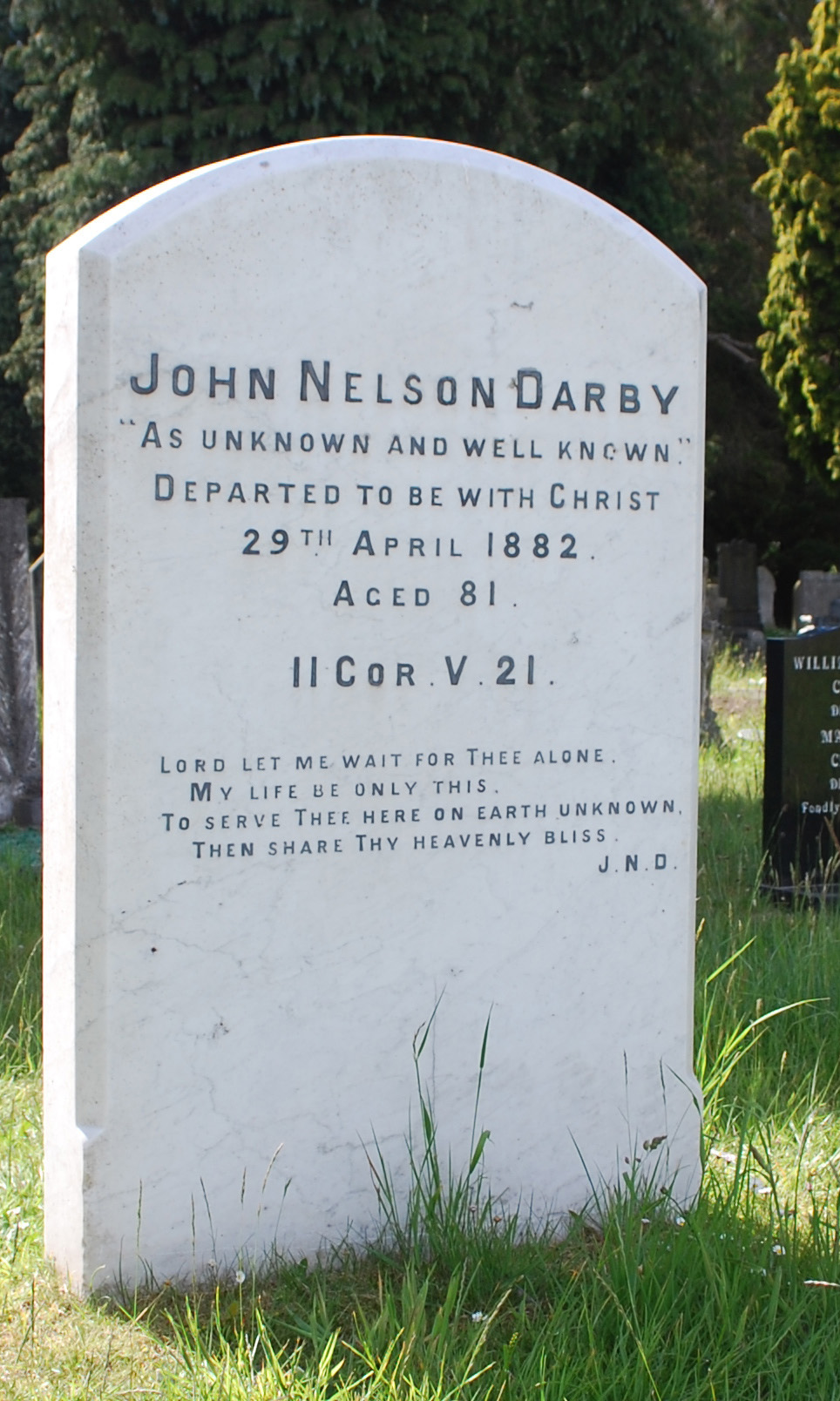 Grab von John Nelson Darby Wimborne Road Cemetery, Bournemouth, England